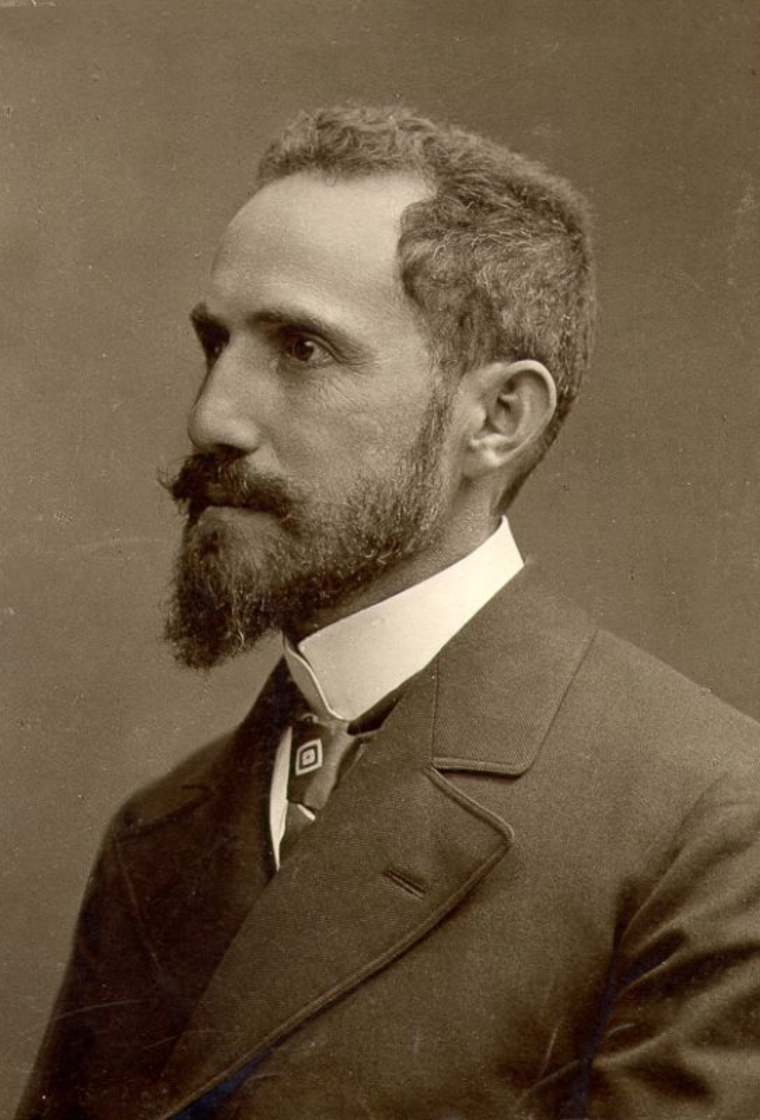 Willy Marckwald (* 5. Dezember 1864 in Jakobskirch (poln. Jakubów); † 1942 in Rolândia, Brasil)